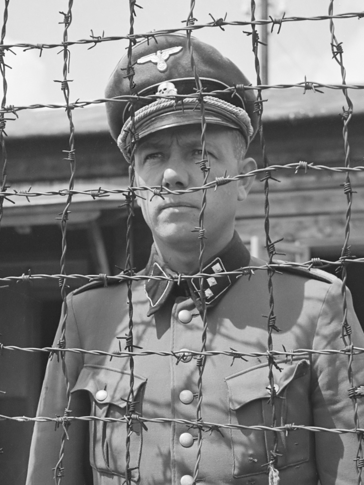 Reportage; Kamp Amersfoort, interneringskamp voor oorlogsmisdadigers en collaborateurs. Kampcommandant K.P. Berg 1945